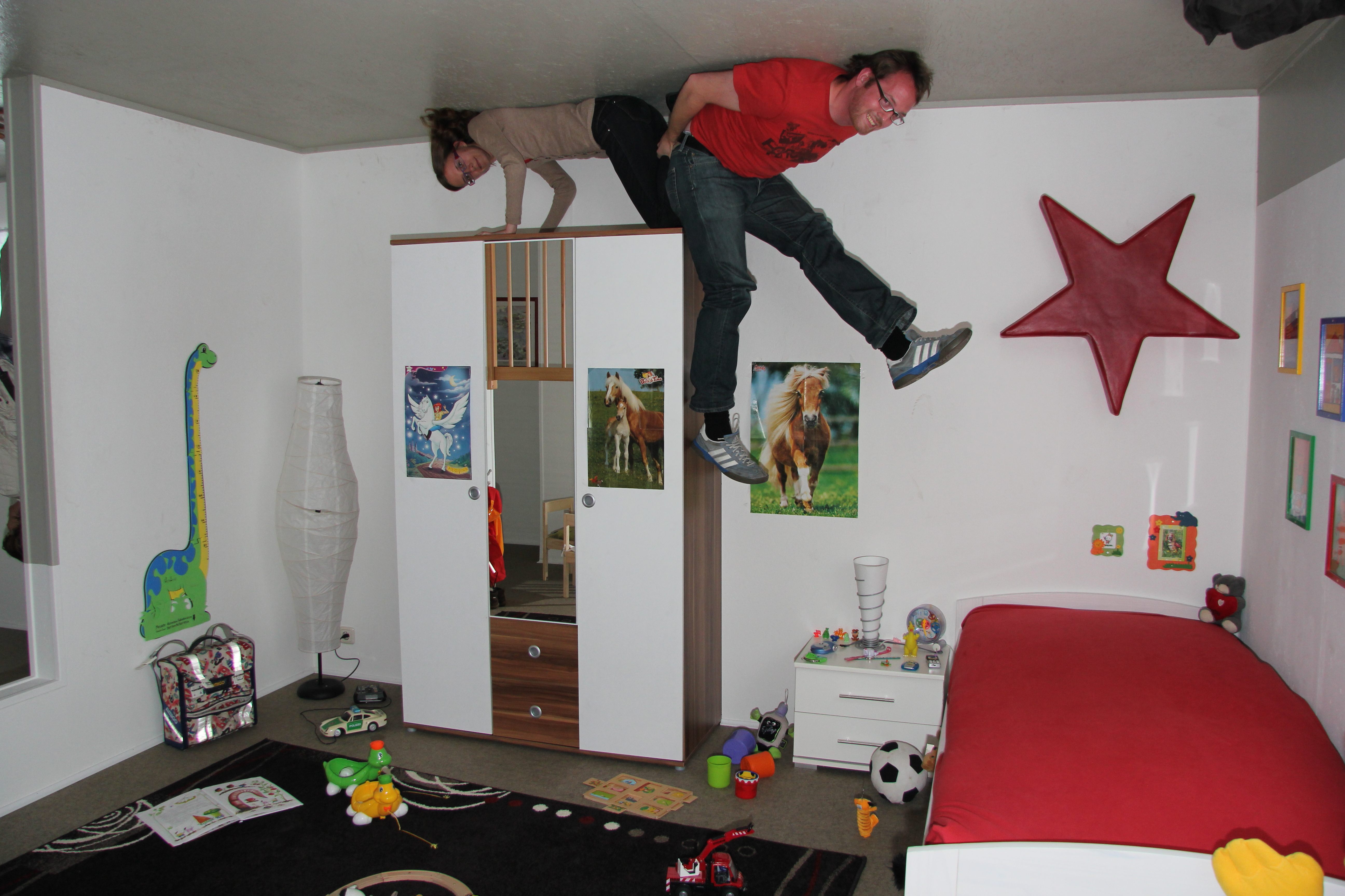 Im verrückten Haus in Bispingen.